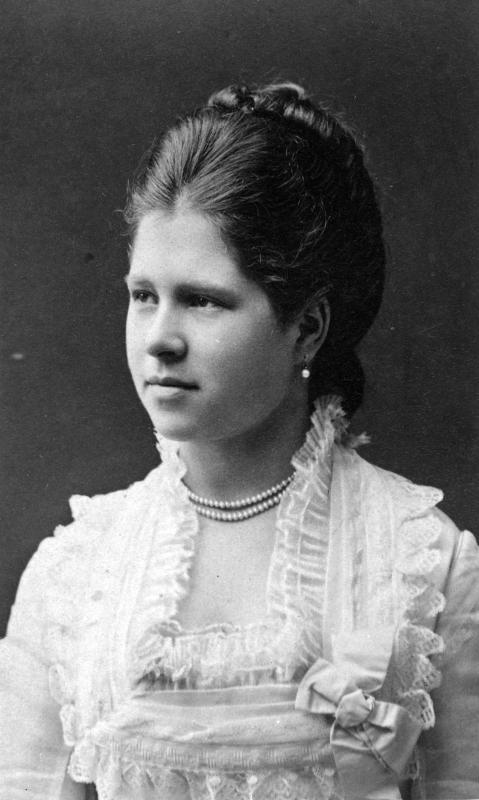 Isabellla von Croy-Dülmen (1865–1931)